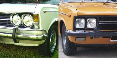 Foto comparativa entre los faros delanteros de un Fiat 1600 Argentino y un Fiat 125.